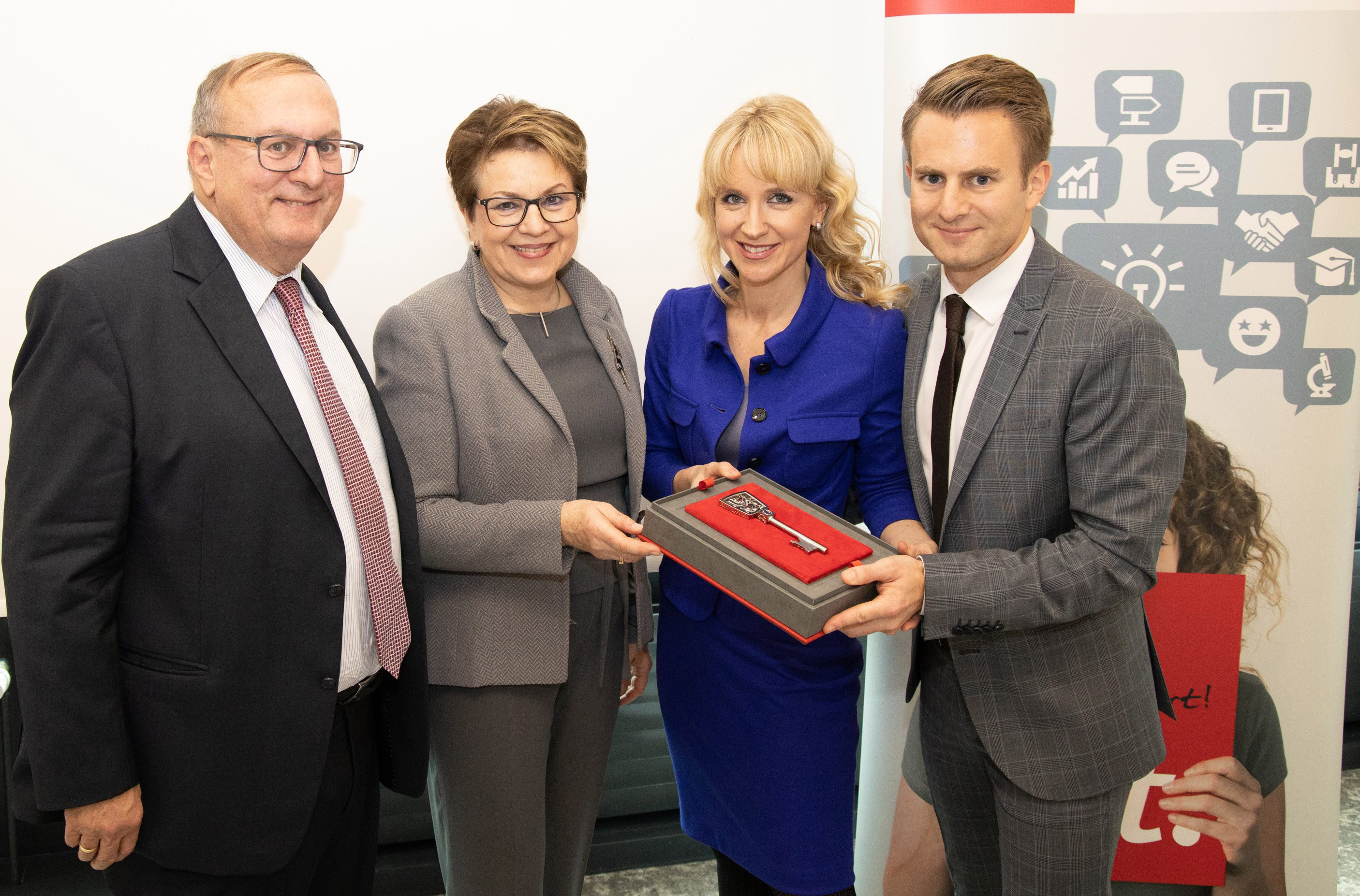 Schlüsselübergabe im Hause Trauner Verlag: Die 1948 gegründete Firma wurde fast drei Jahrzehnte von Ingrid und Rudolf Trauner geleitet, jetzt übernehmen Sonja und Rudolf Trauner die Geschäftsführung.